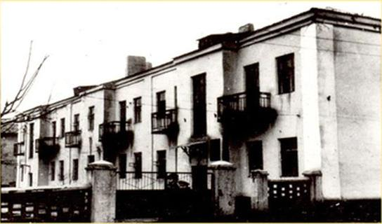 Старый учебный корпус